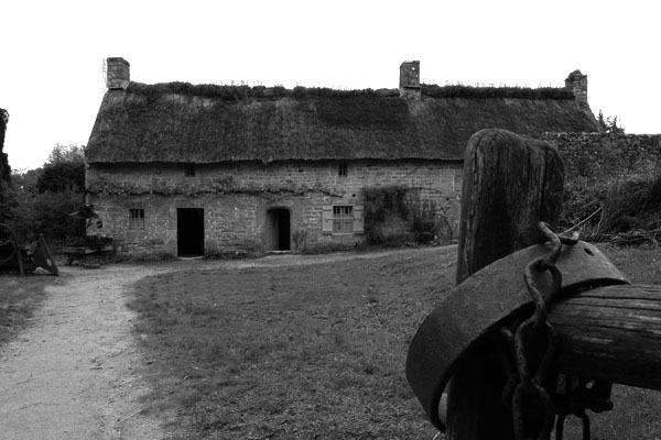 Brech St Degan Ecomusé